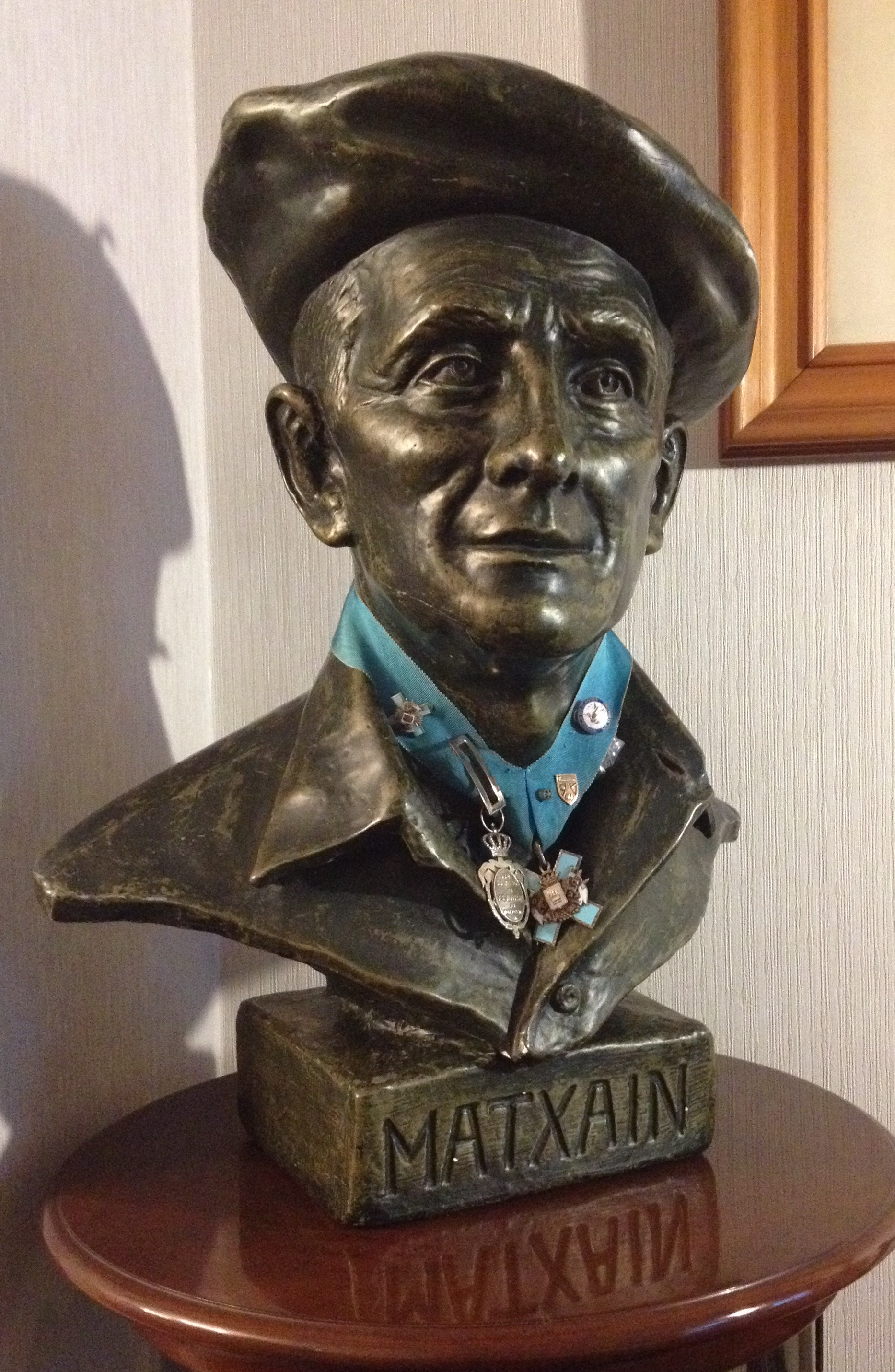 Manuel Matxain-en bustoa Donostiako udalak eman zion dominarekin